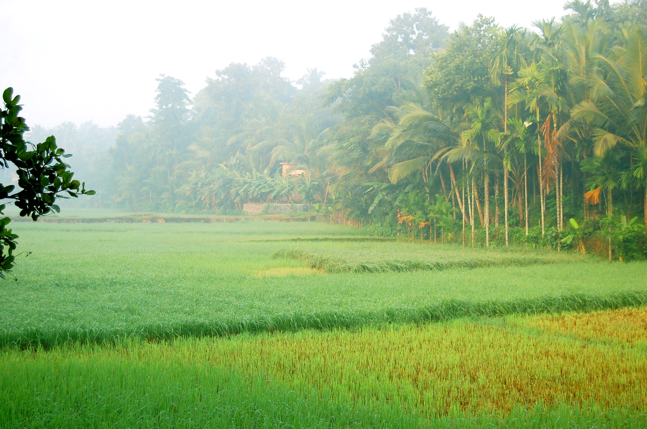 കൊടിയത്തൂ‍രിലെ നെല്പ്പാടം